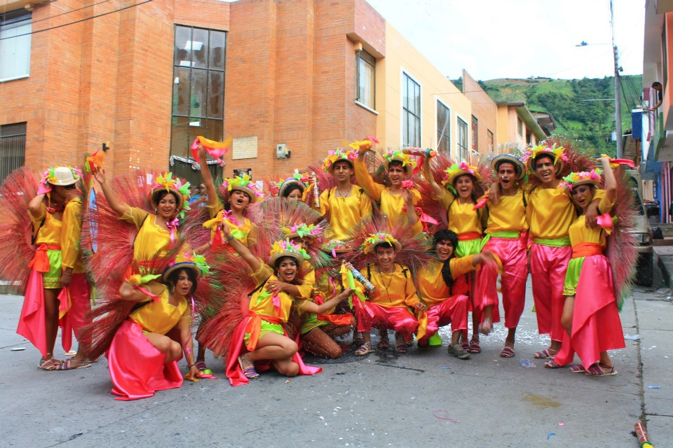 paisaje linares